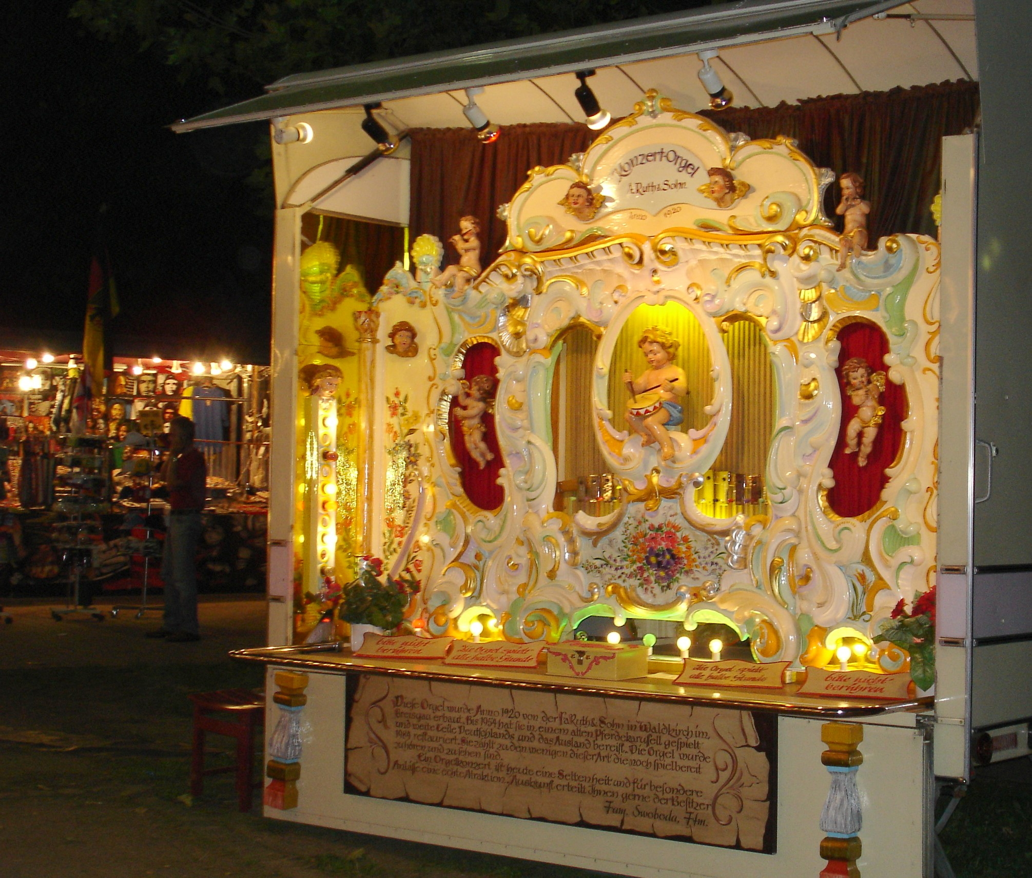 Jahrmarktsorgel auf dem Berger Markt Konzert-Orgel, A. Ruth & Sohn (1920) “ Diese Orgel wurde anno 1920 von der Firma Ruth & Sohn in Waldkirch im Breisgau erbaut. Bis 1954 hat sie in einem alten Pferdekarusell gespielt und weite Teile Deutschlands und das Ausland bereist. Die Orgel wurde 1984 restauriert. Sie zählt zu den wenigen dieser Art, die noch spielbereit zu hören und zu sehen sind. Ein Orgelkonzert ist heute eine Seltenheit und für besondere Anlässe eine echte Attraktion. Auskunft erteilt Ihnen gerne der Besitzer. Fam. Swoboda, Ffm. ”